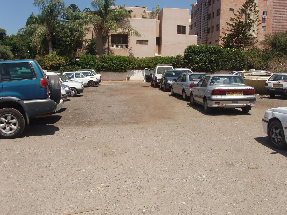 Parking lot in Ramat Hasharon, Israel.